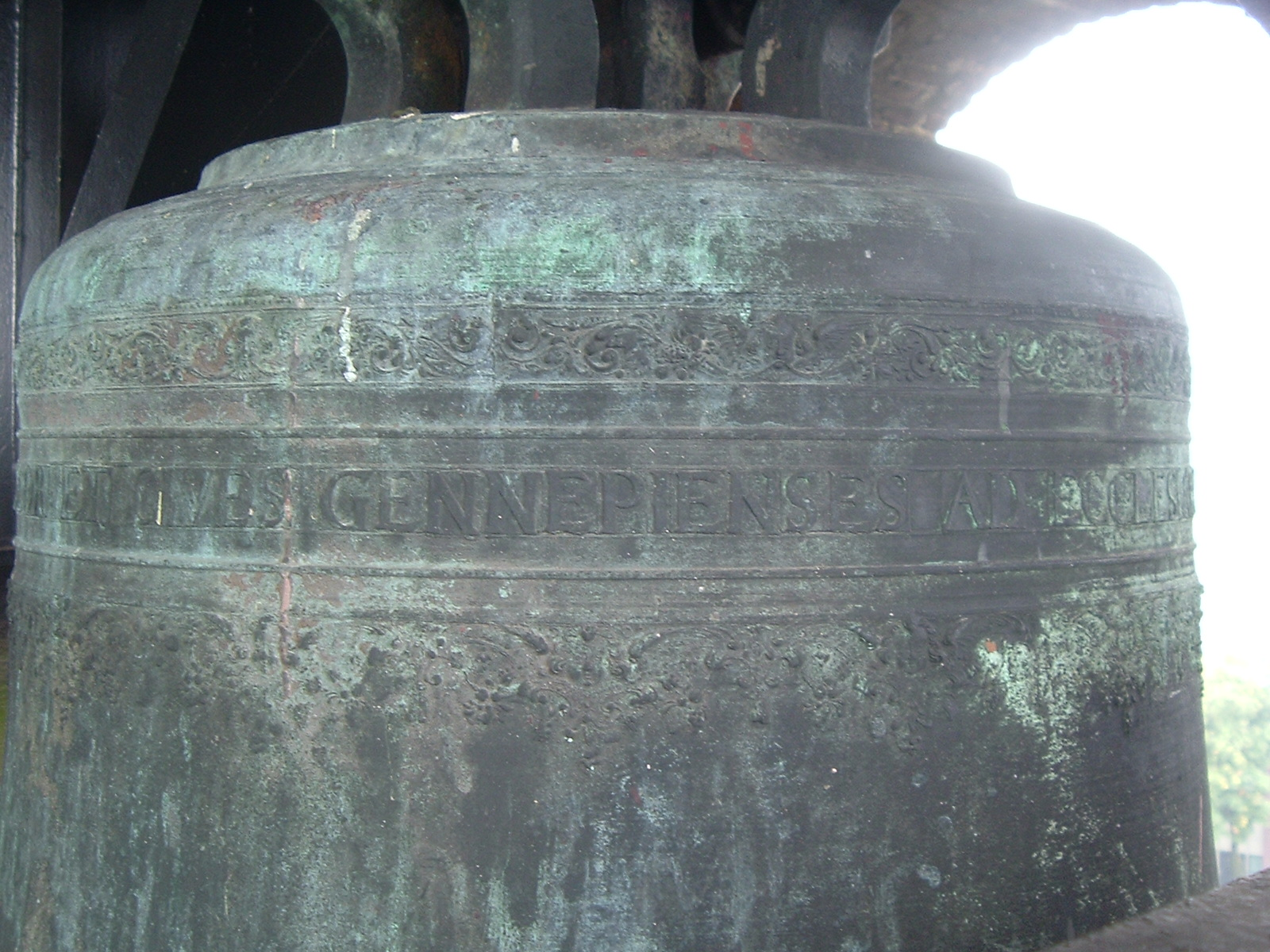 Klok van de Sint-Martinuskerk (Gennep) 2005 (c) Looi